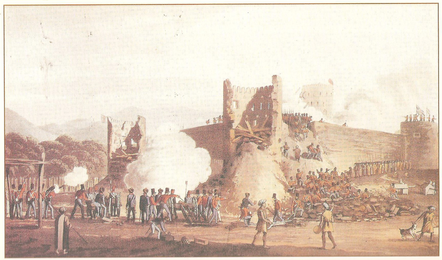 القوات البريطانية و العمانية تهاجم رأس الخيمة في الحملة البريطانية الرابعة